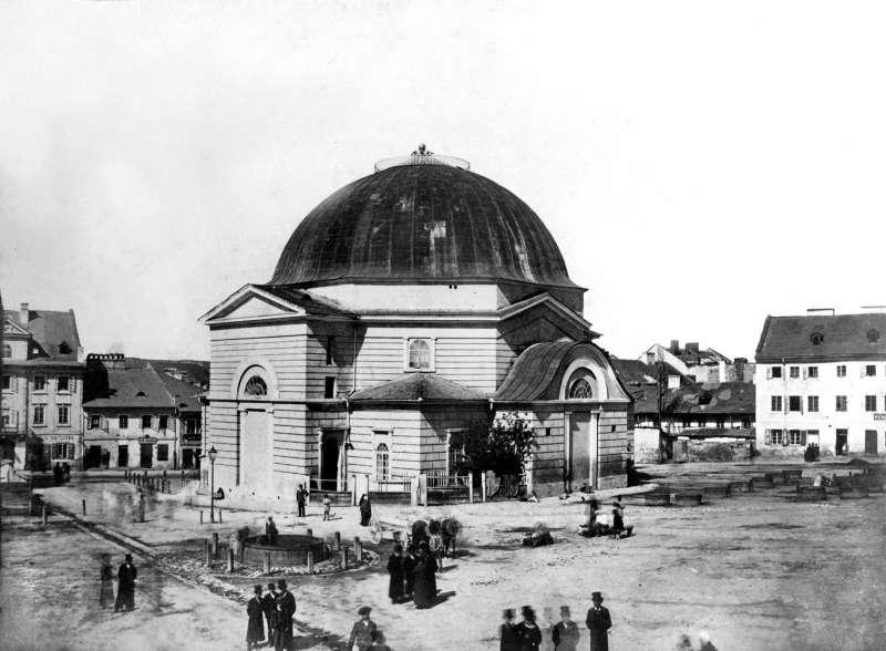 Реформістська синагога "Темпль" у Львові на площі Старий Ринок.